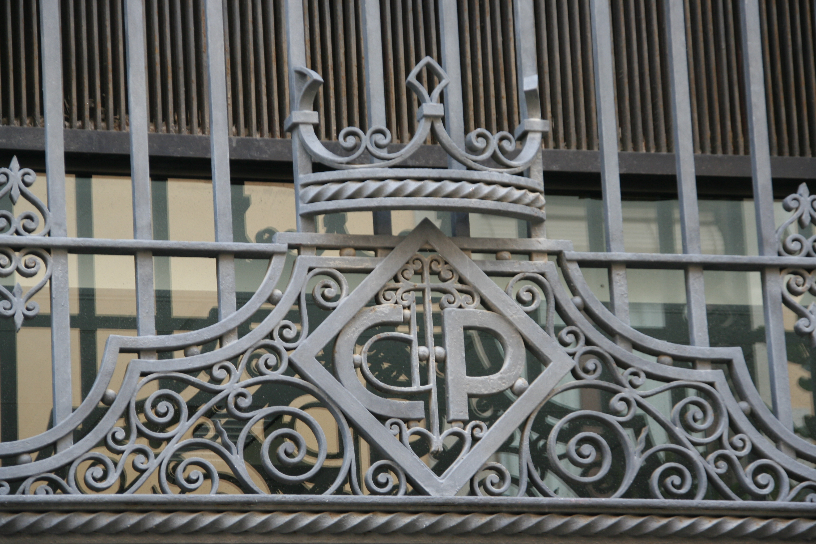 Edifici de La Caixa (Sant Feliu de Guíxols)